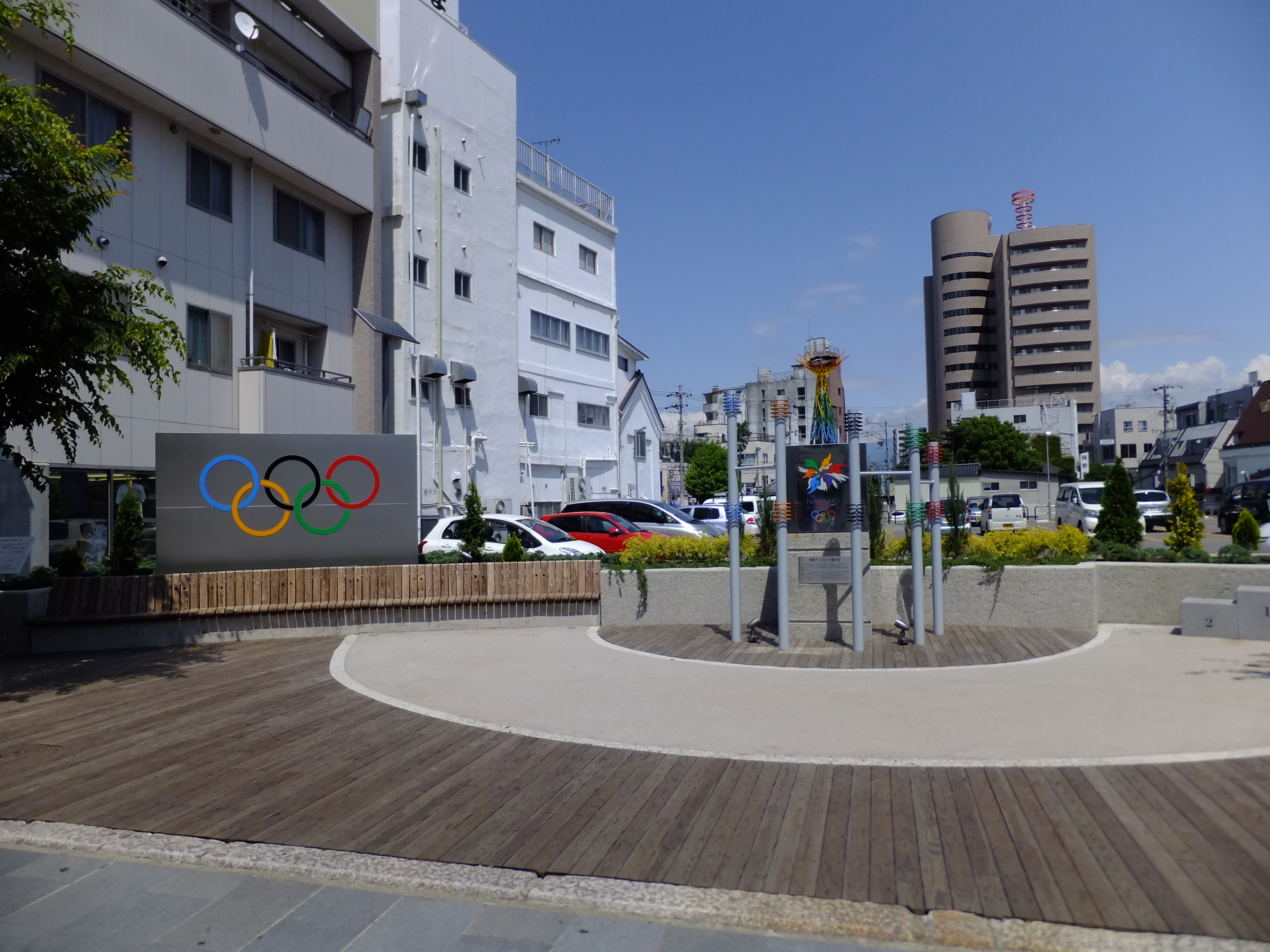 長野市のセントラルスクゥエアに2012年4月に整備された表参道長野オリンピックメモリアルパーク。聖火台のミニチュアレプリカ等が設置されている。